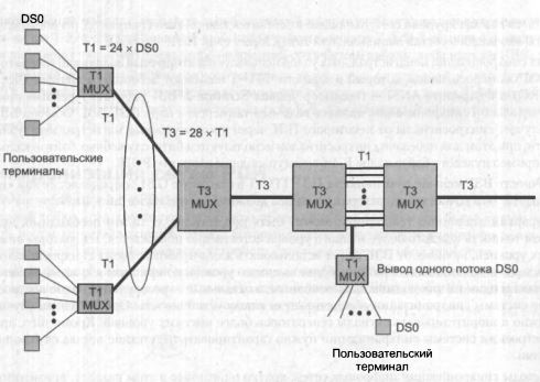 Выделение низкоскоростного канала путем полного демультиплексирования